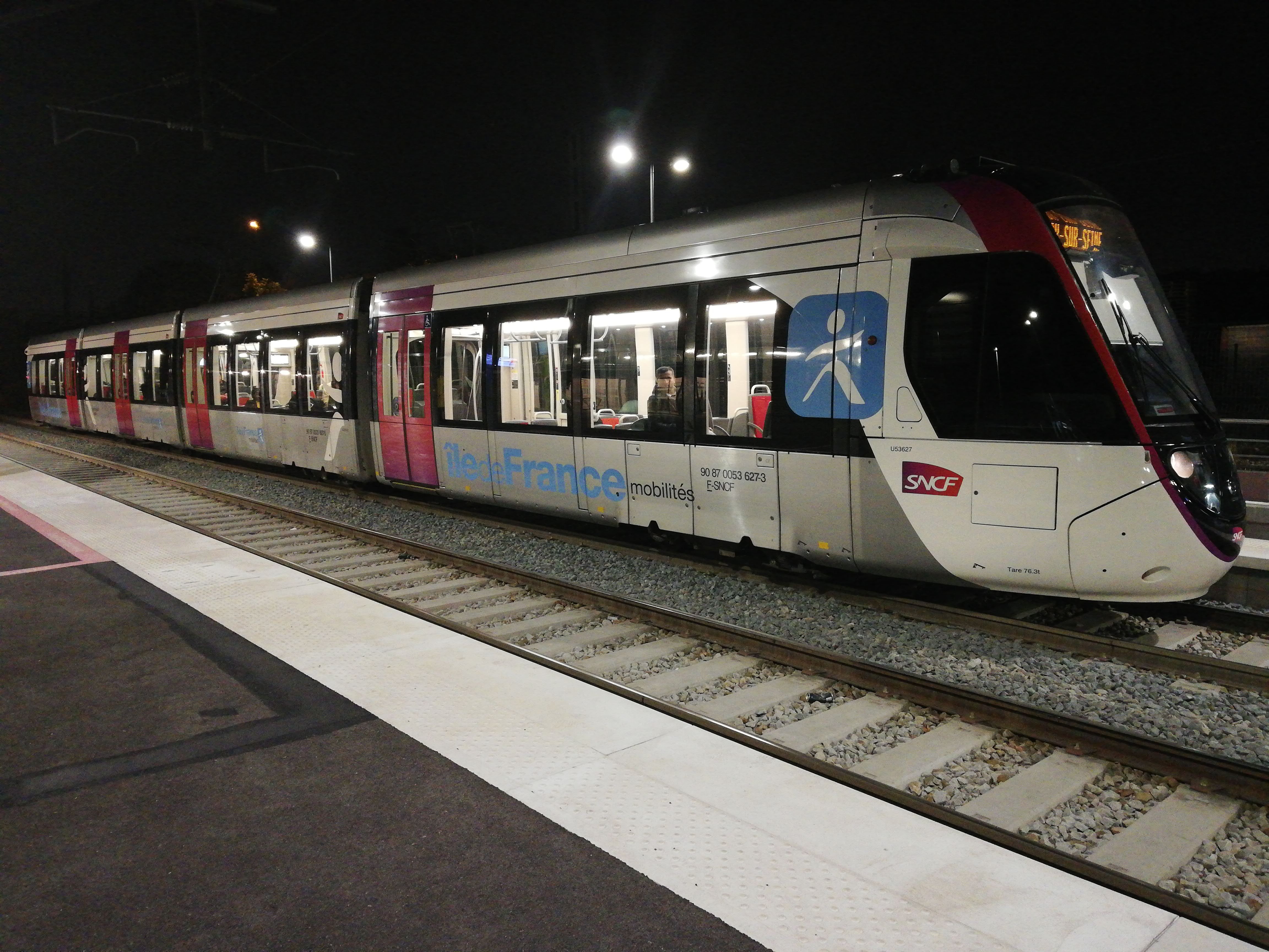 Un Citadis Dualis à livrée IDFM stationne en gare de Dugny-La Courneuve en attendant de partir en direction d'Épinay-sur-Seine, de nuit, en 2018.